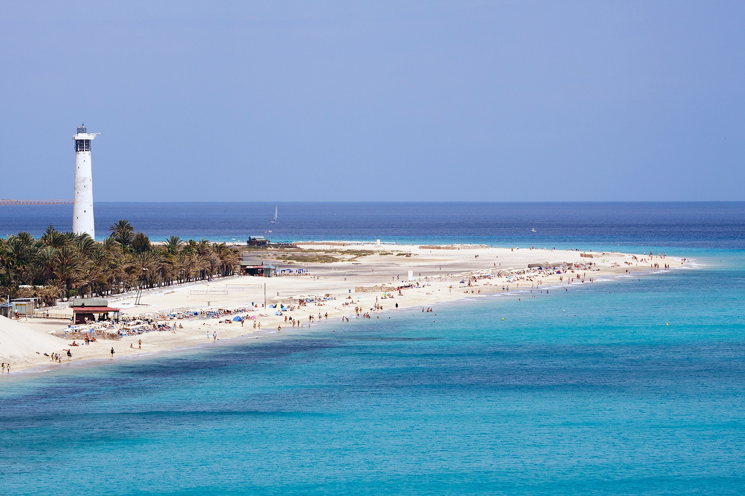 Strand und Leuchtturm von Morro Jable, Halbinsel Jandia, Fuerteventura, Kanarische Inseln, Spanien